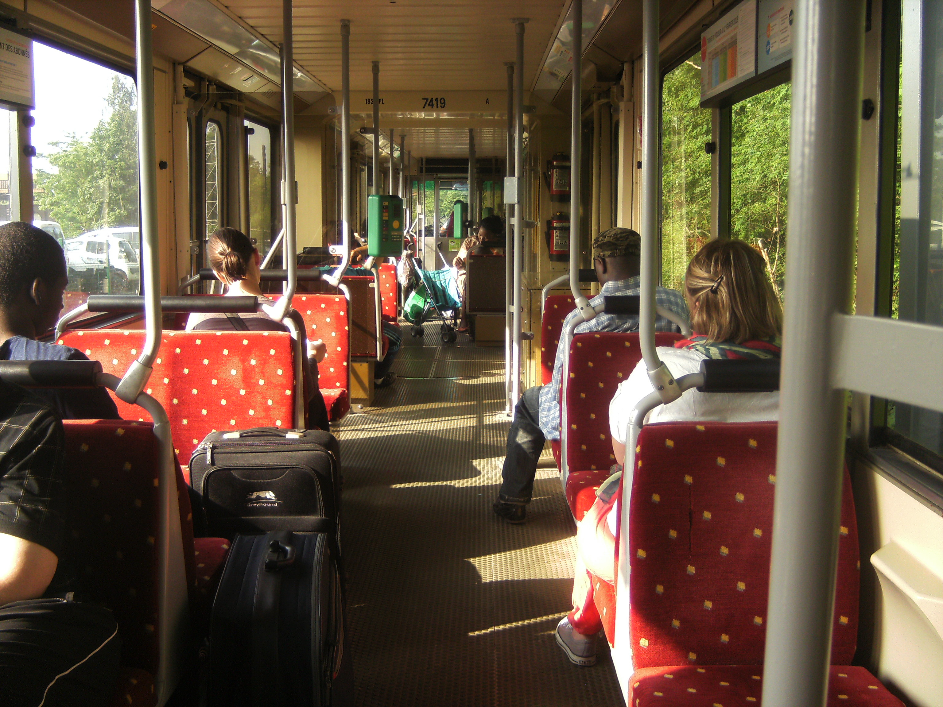 Métro léger de Charleroi - intérieur d'un véhicule (7419) - entre l'arrêt Sacré Madame et la station Piges.